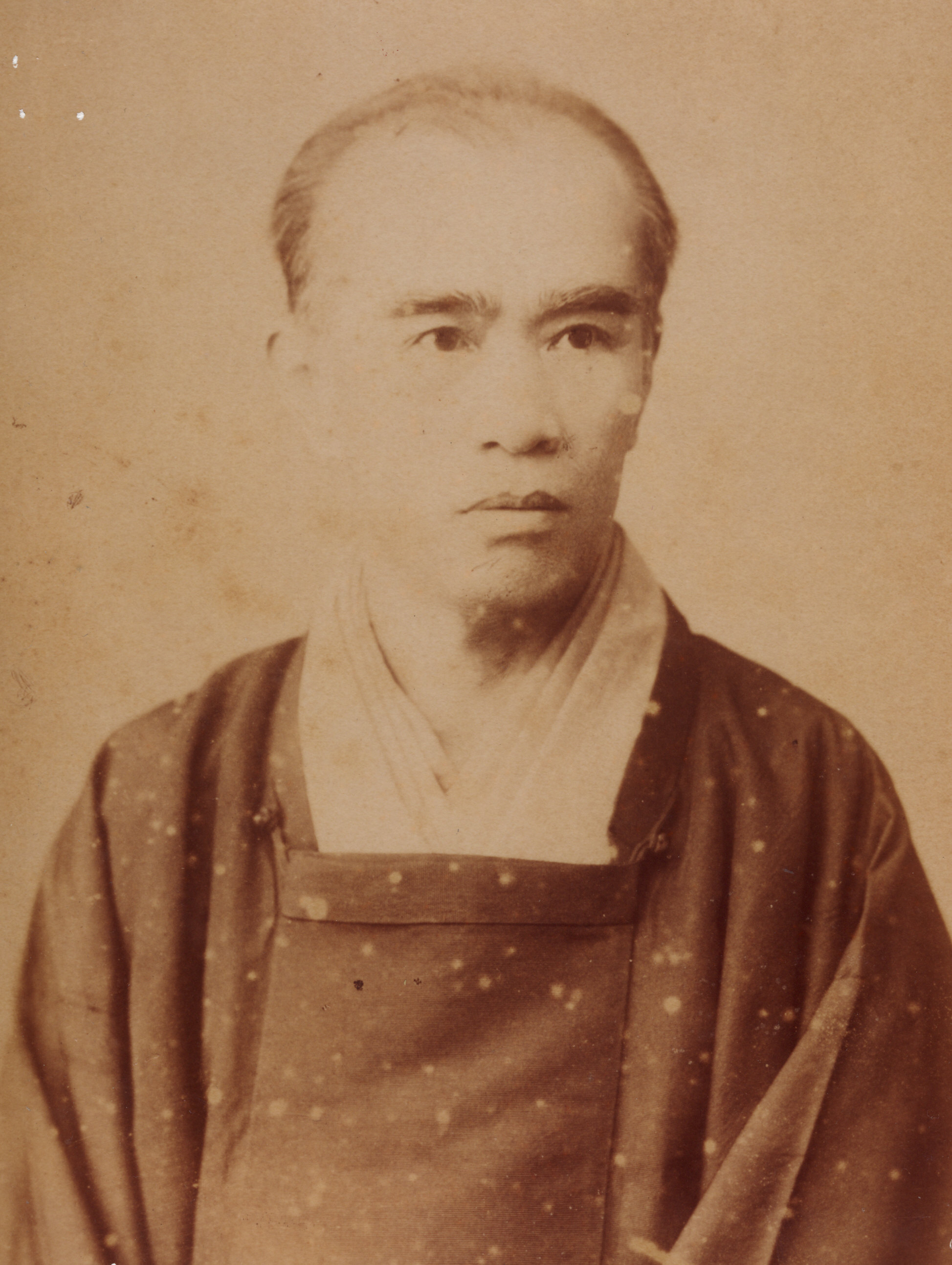 多田親愛（1840-1905）：明治時代の代表的かな書き書家